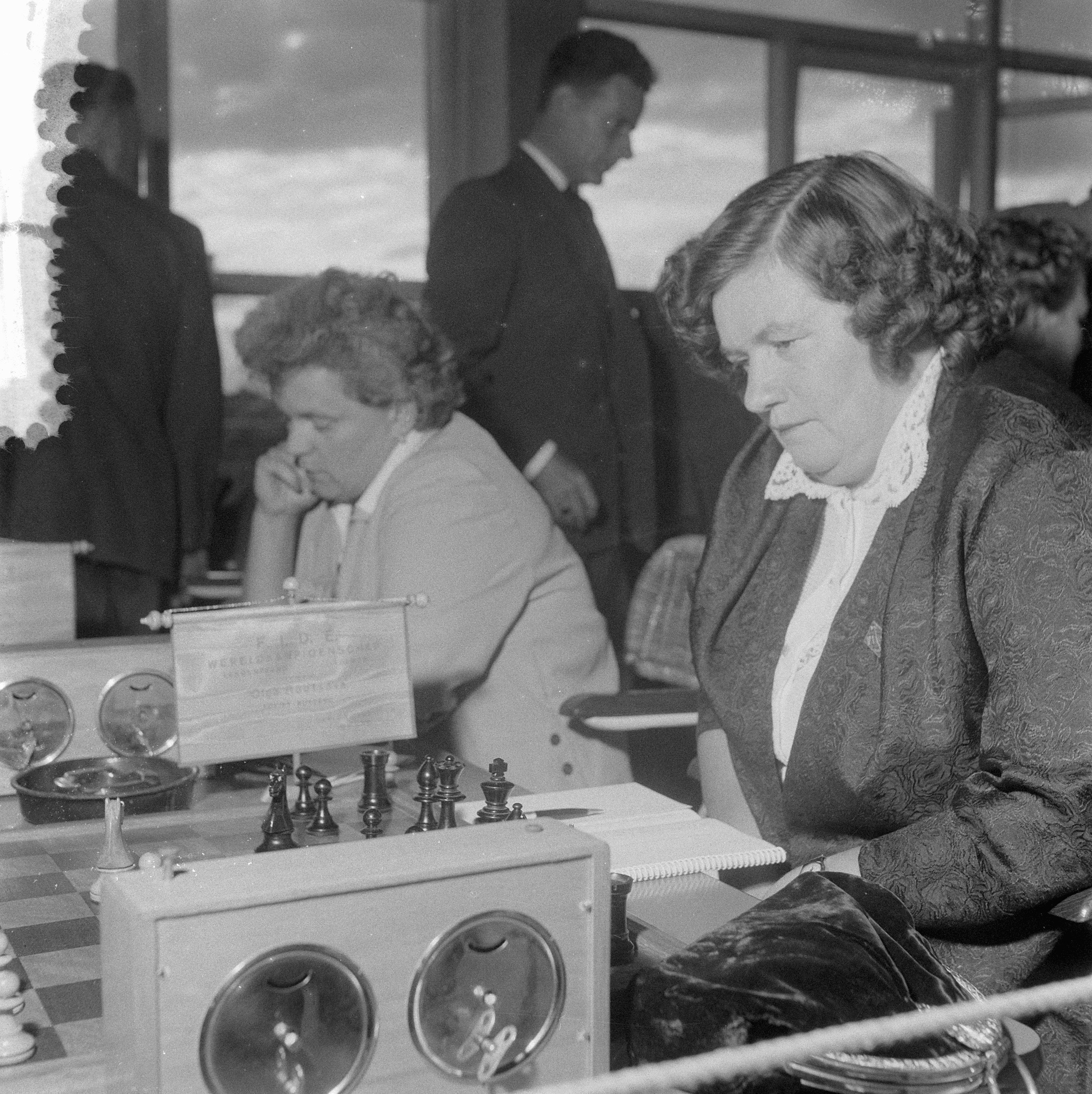 Collectie / Archief : Fotocollectie Anefo Reportage / Serie : [ onbekend ] Beschrijving : Eerste ronde Internationaal Damesschaaktoernooi te Emmen Datum : 3 september 1957 Locatie : Emmen Trefwoorden : Schaken, ronden Fotograaf : Koch, Eric / Anefo Auteursrechthebbende : Nationaal Archief Materiaalsoort : Negatief (zwart/wit) Nummer archiefinventaris : bekijk toegang 2.24.01.03 Bestanddeelnummer : 908-9174